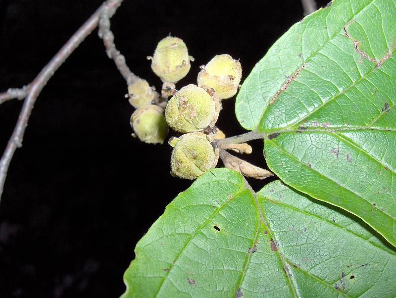 Witch Hazel